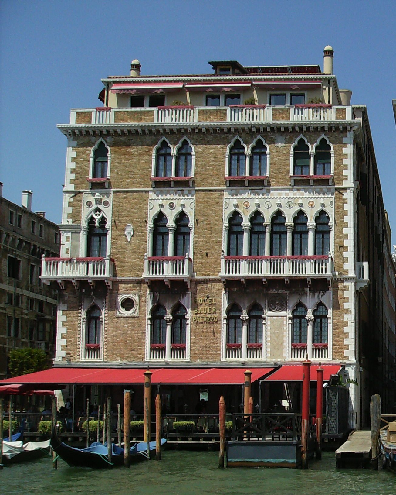 Hotel Bauer Palazzo - Venise